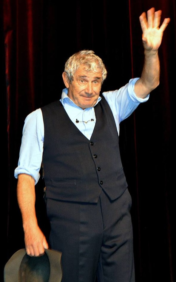 Michel Boujenah interprétant son spectacle "Ma vie encore plus rêvée" au Théâtre de la Gaîté-Montparnasse.